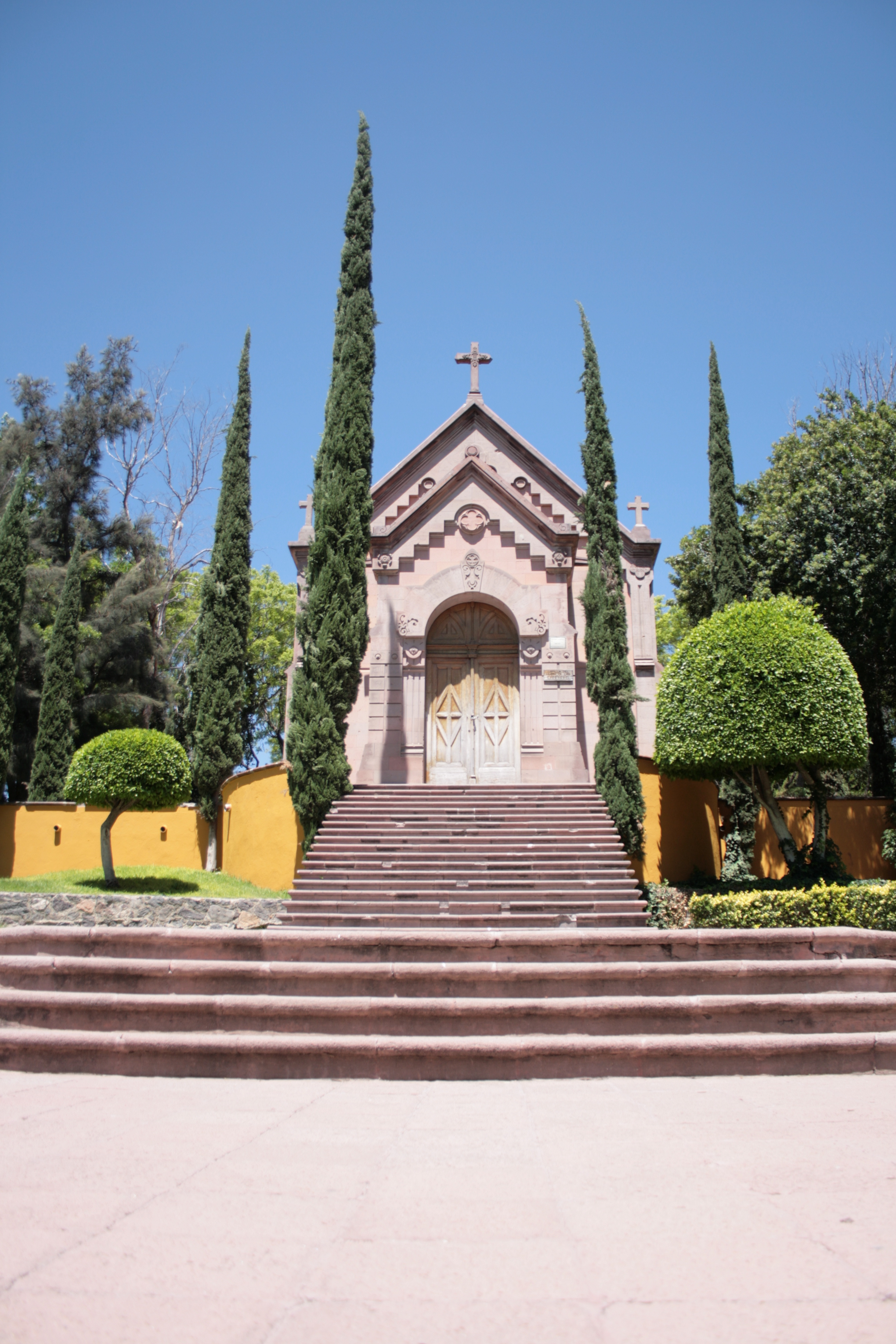 Capilla de Maximiliano de Habsburgo